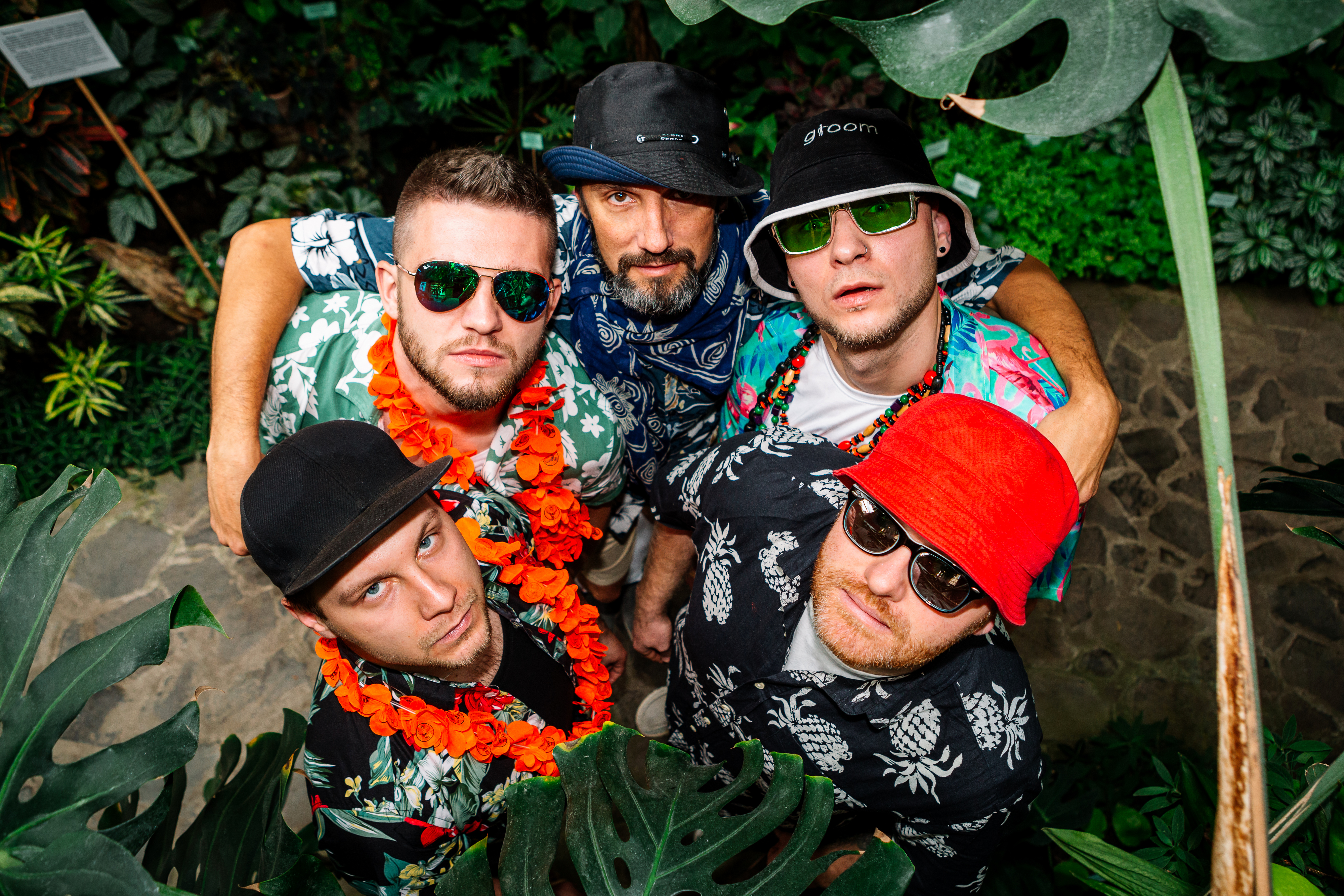 Беларуская (тарашкевіца): Zolki Band у 2019 годзе (зьлева направа: shell, kukuruzo, trikil, f.s.t., green).